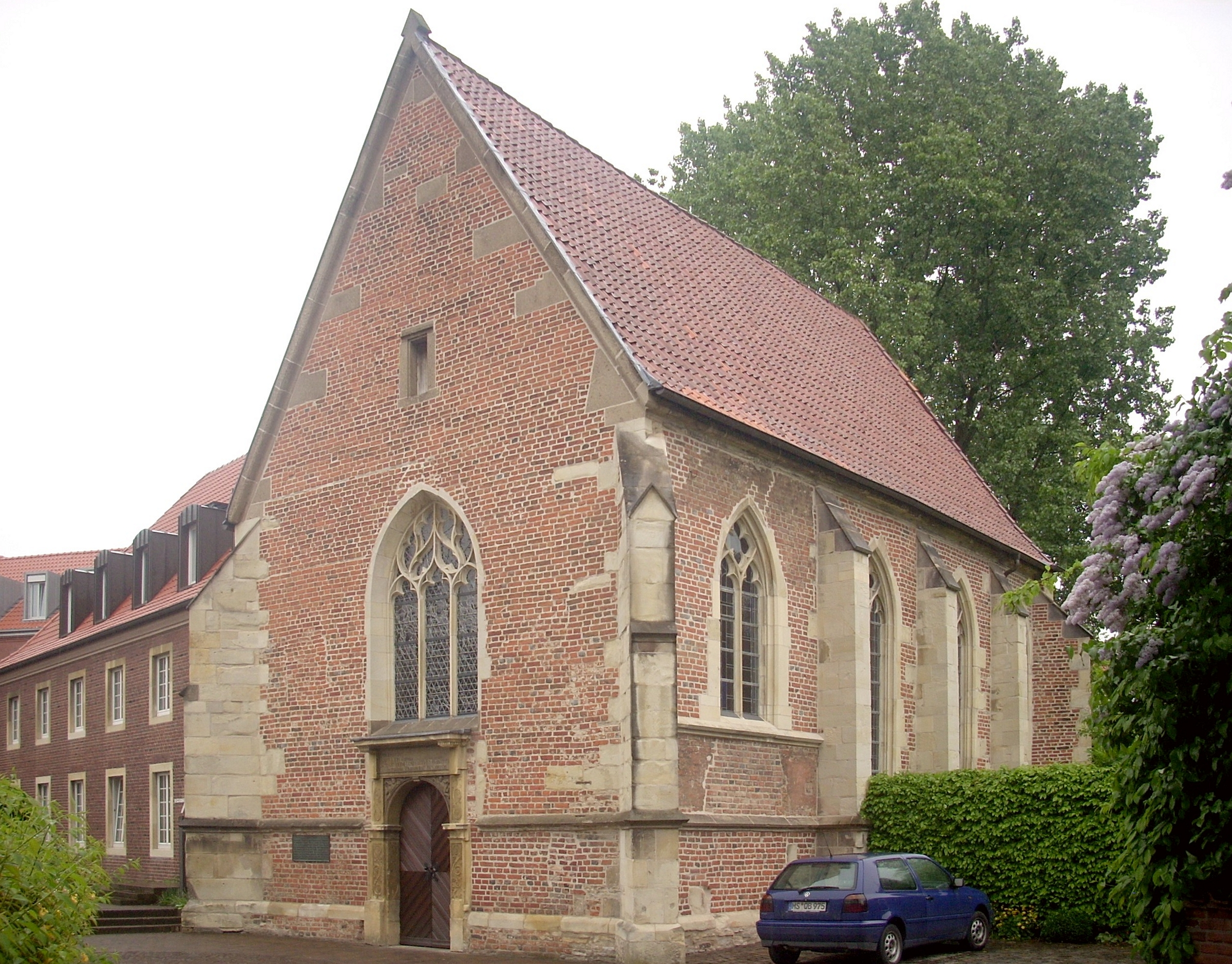 Münster, evang. St.-Johannes-Kapelle